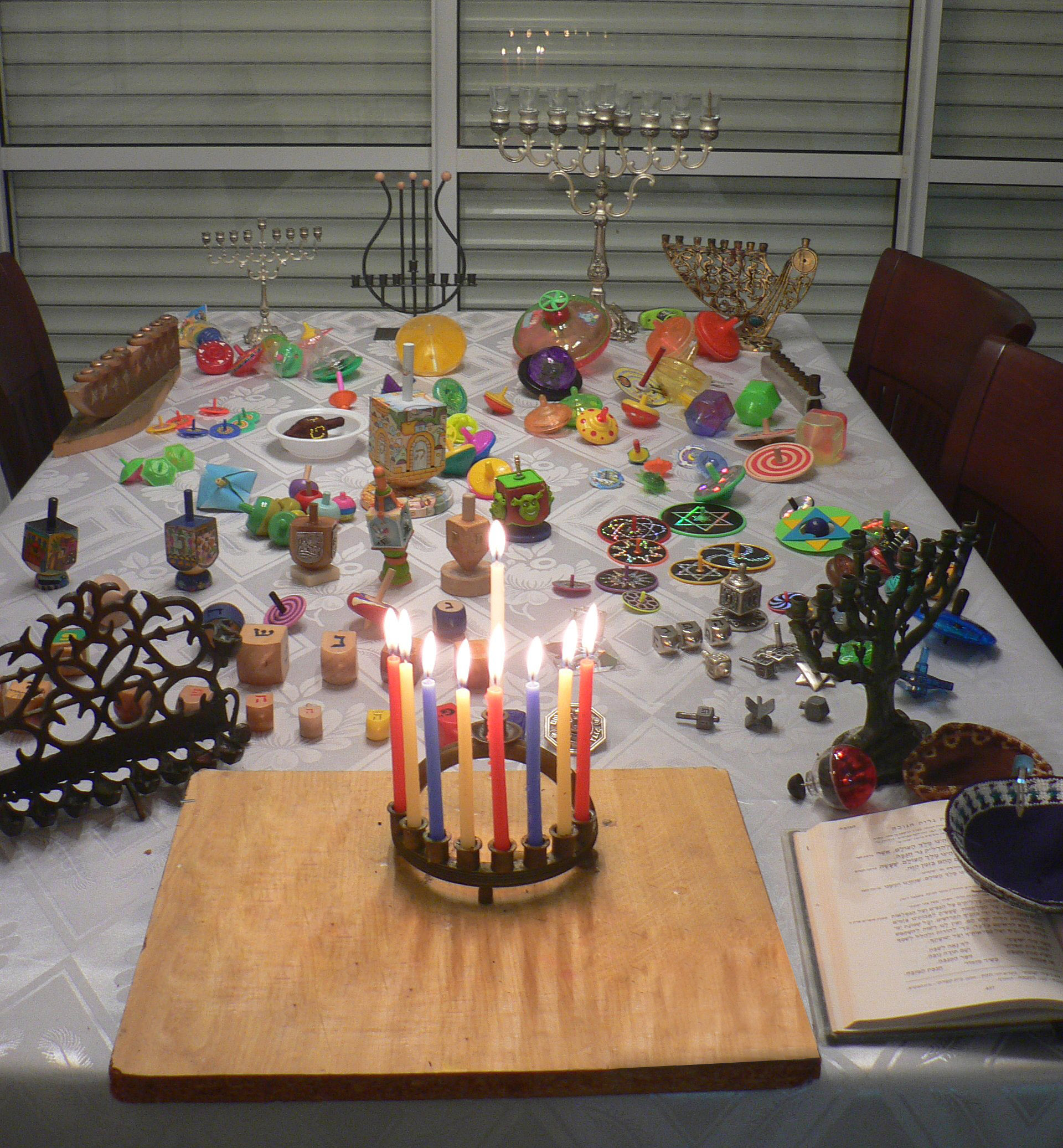 חנוכה Hanukkah \ Chanuka \ Chanukkah \ Hanukah